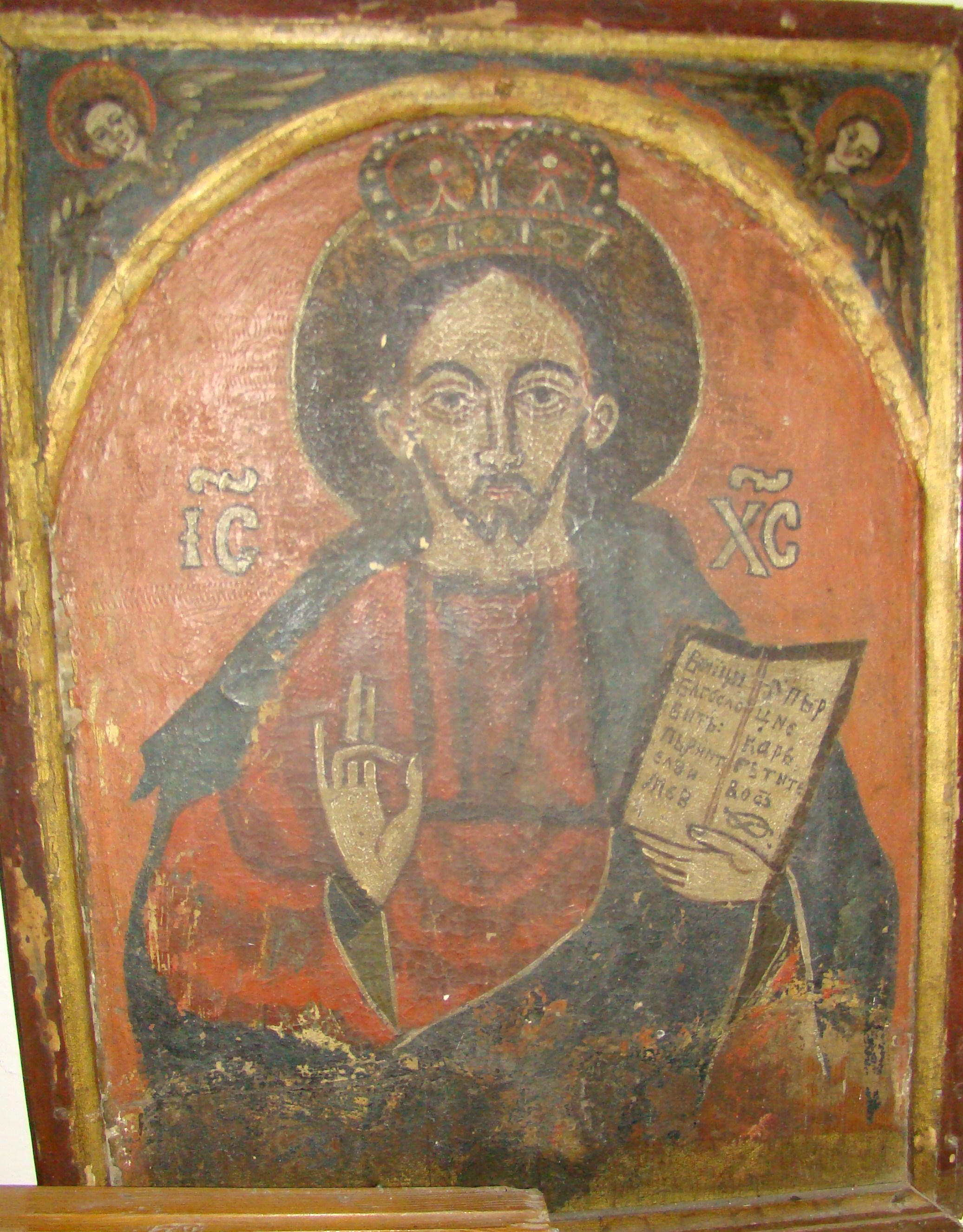 Icoană din Muzeul Parohiei Homorog, județul Bihor